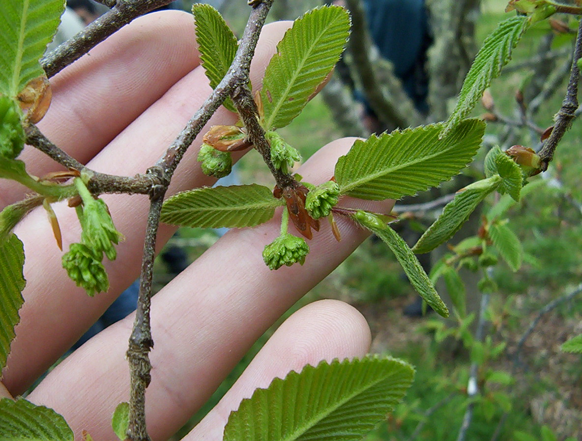 Flor masculina de Nothofagus alpina (Raulí) obtenida en la provincia de Valdivia, Chile